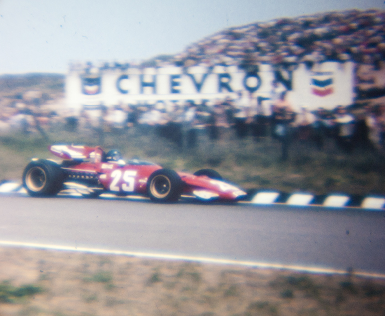 Жаки Икс на Ferrari 312B во время одного из Гран-при 1970 года